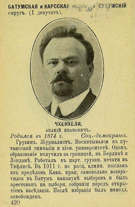 Портрет Чхенкели (Чхенхели), Акакий Иванович